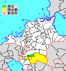 福岡県八女郡の範囲